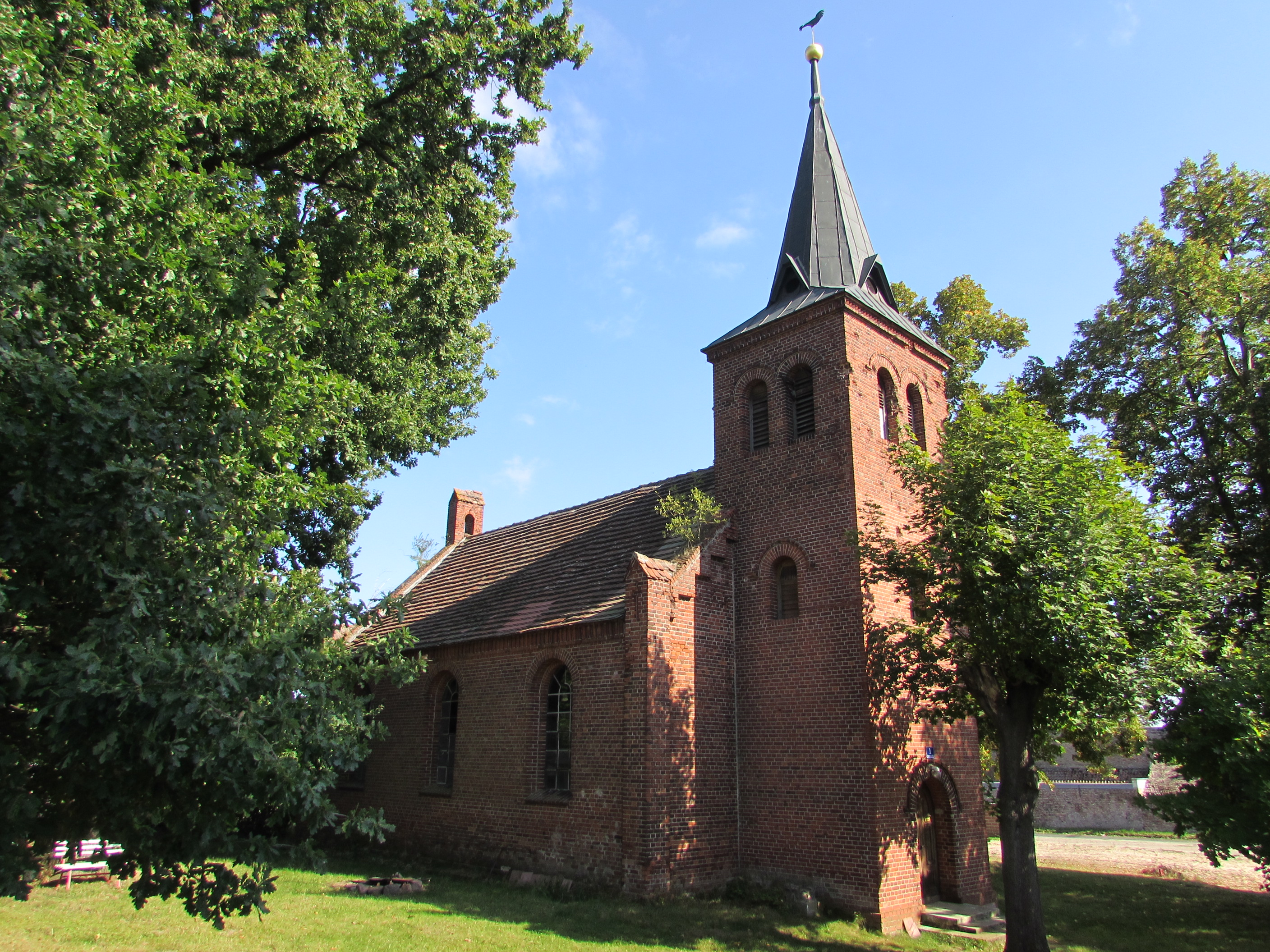 kirche briest von norwesten